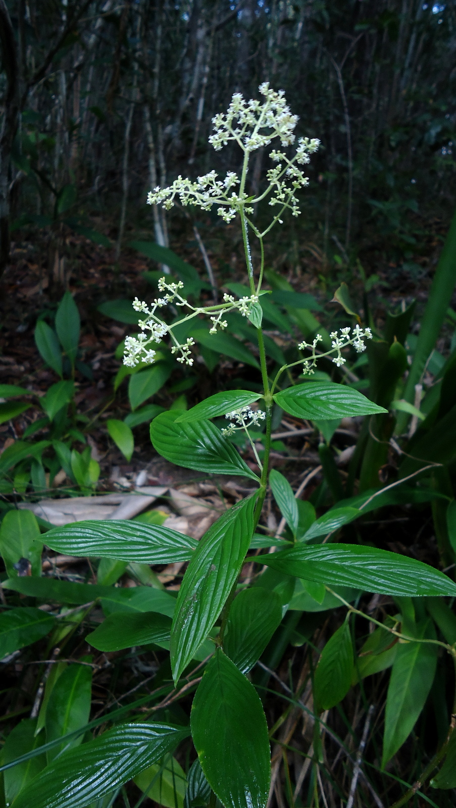 Emmeorhiza umbellata (Spreng.) K. Schum.